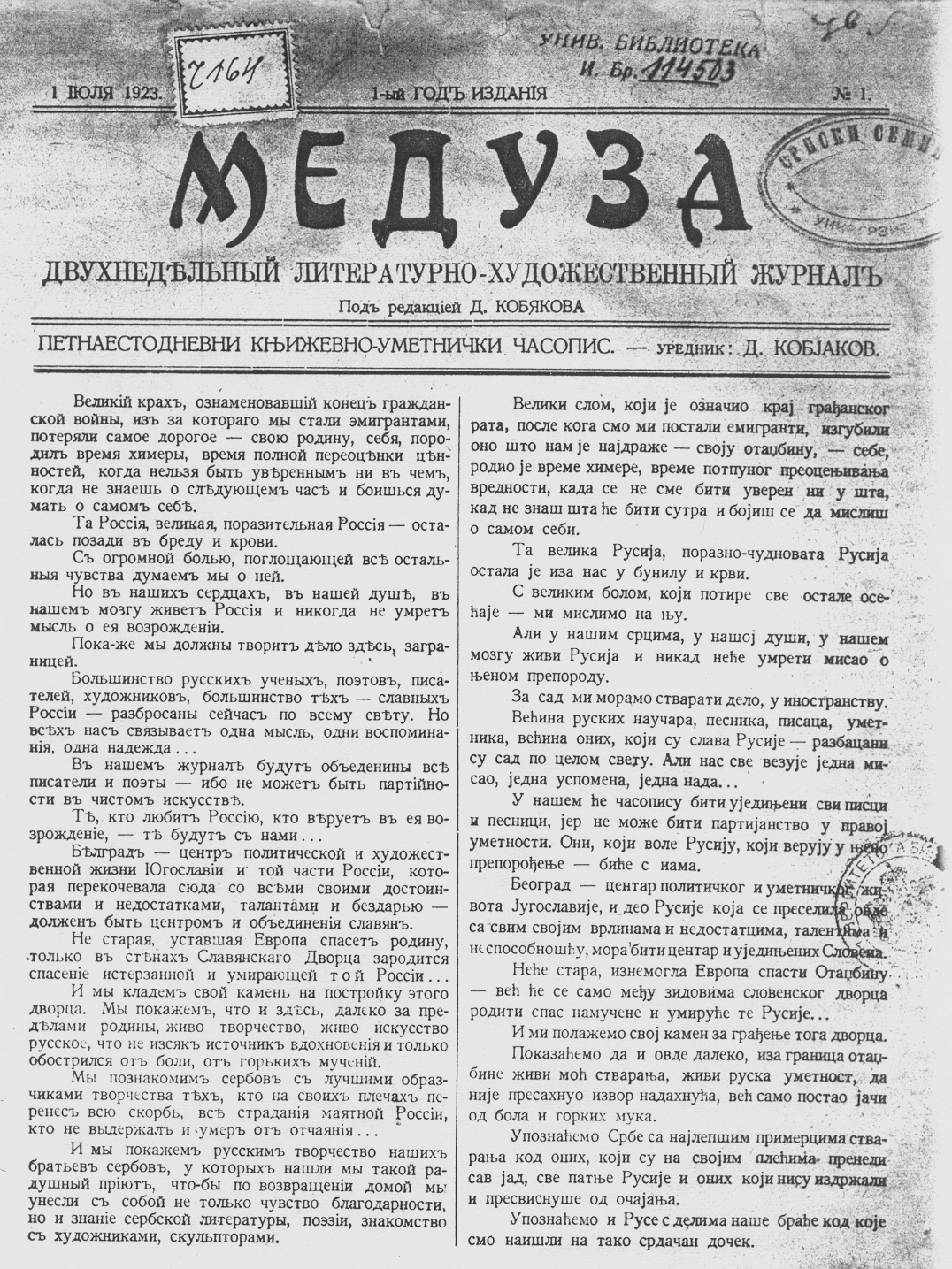 копия 1-й страницы газеты "Медуза", единственный номер которой вышел в 1923 году в Белграде (редактор Д. Ю. Кобяеков)